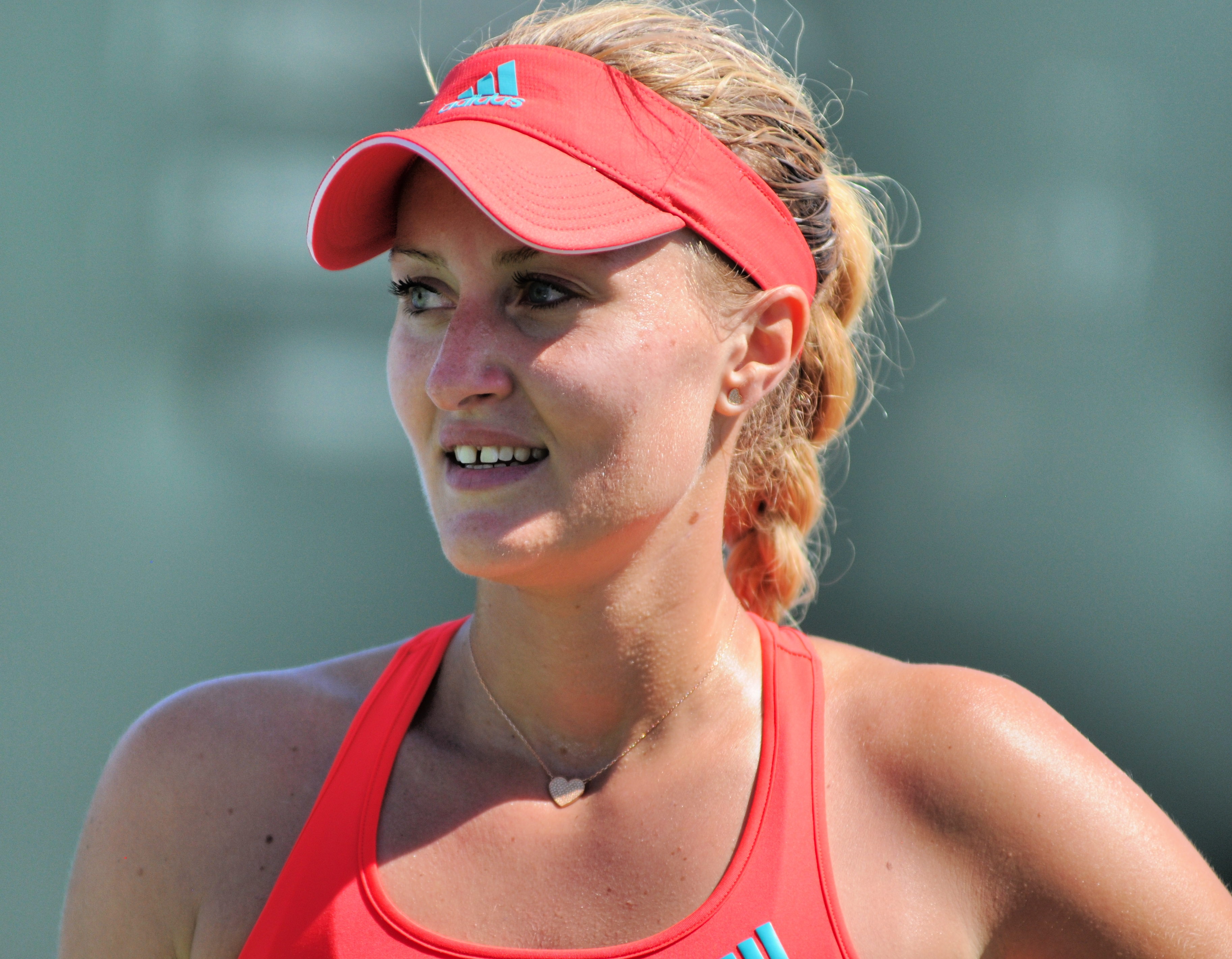 BNP Paribas Open 2016